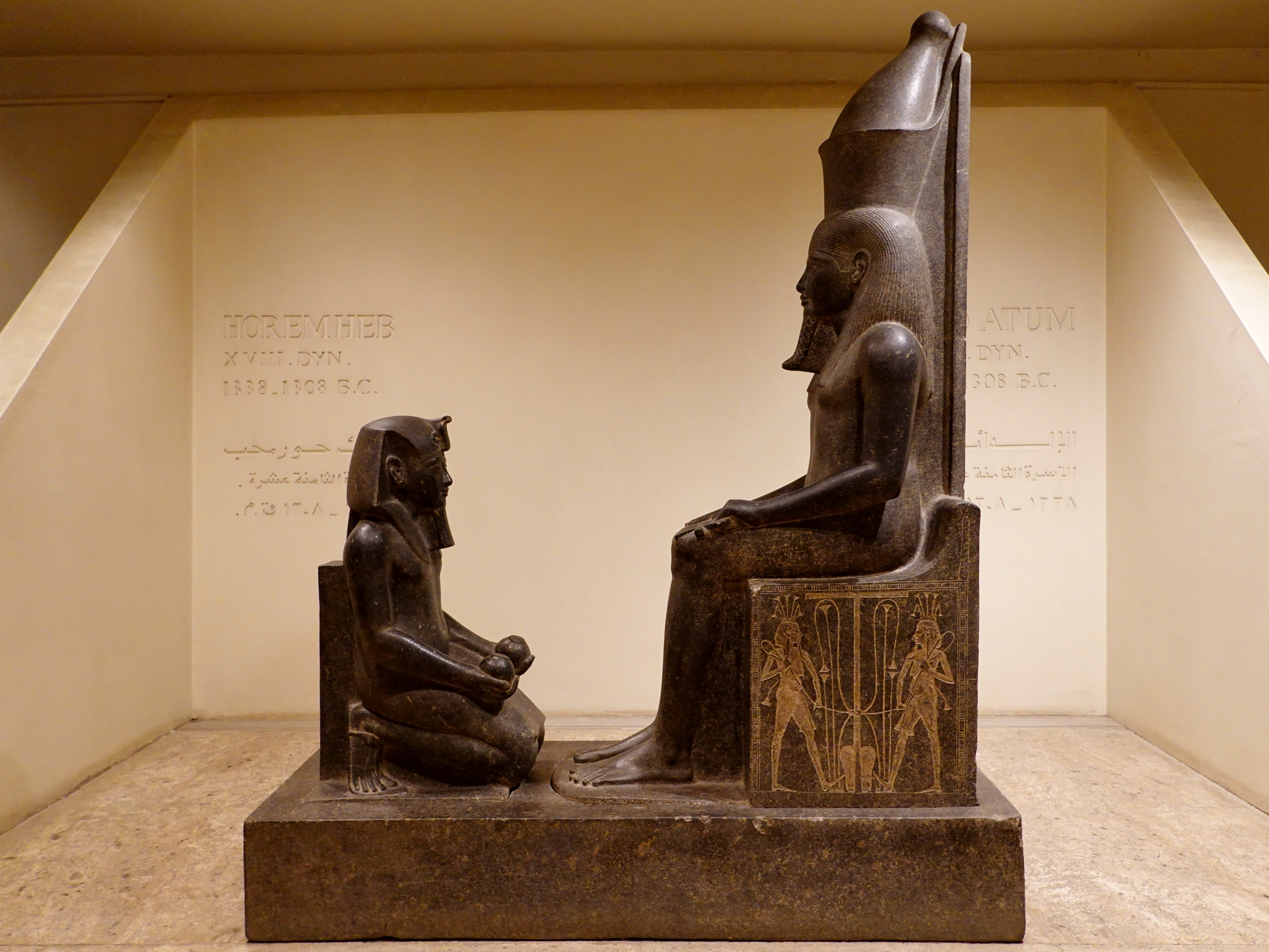 Statuen des Königs Haremhab vor dem Gott Atum (Diorit, 18. Dynastie), gefunden 1987 in der Cachette des Luxor-Tempels, ausgestellt im Luxor-Museum, Ägypten